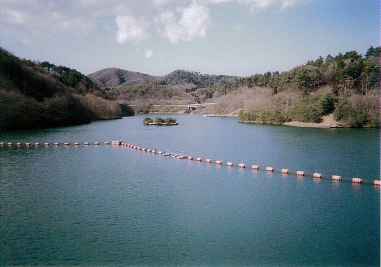 Lake